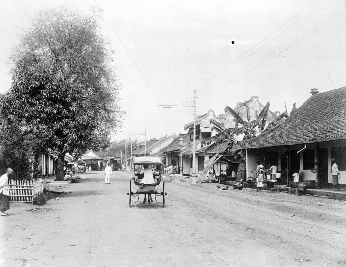 Repronegatief. Batavia, Pasar Tanah Abang